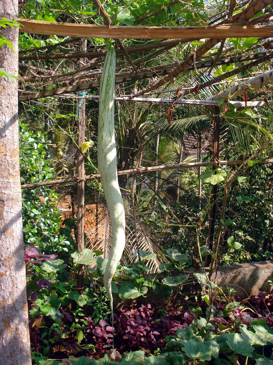 പടവലം Snake gourd Name: Trichosanthes cucumerina Family: Cucurbitaceae കേരളീയർ ഇഷ്ടപ്പെടുന്ന ഒരു പച്ചക്കറി വിളയാണ് പടവലം.